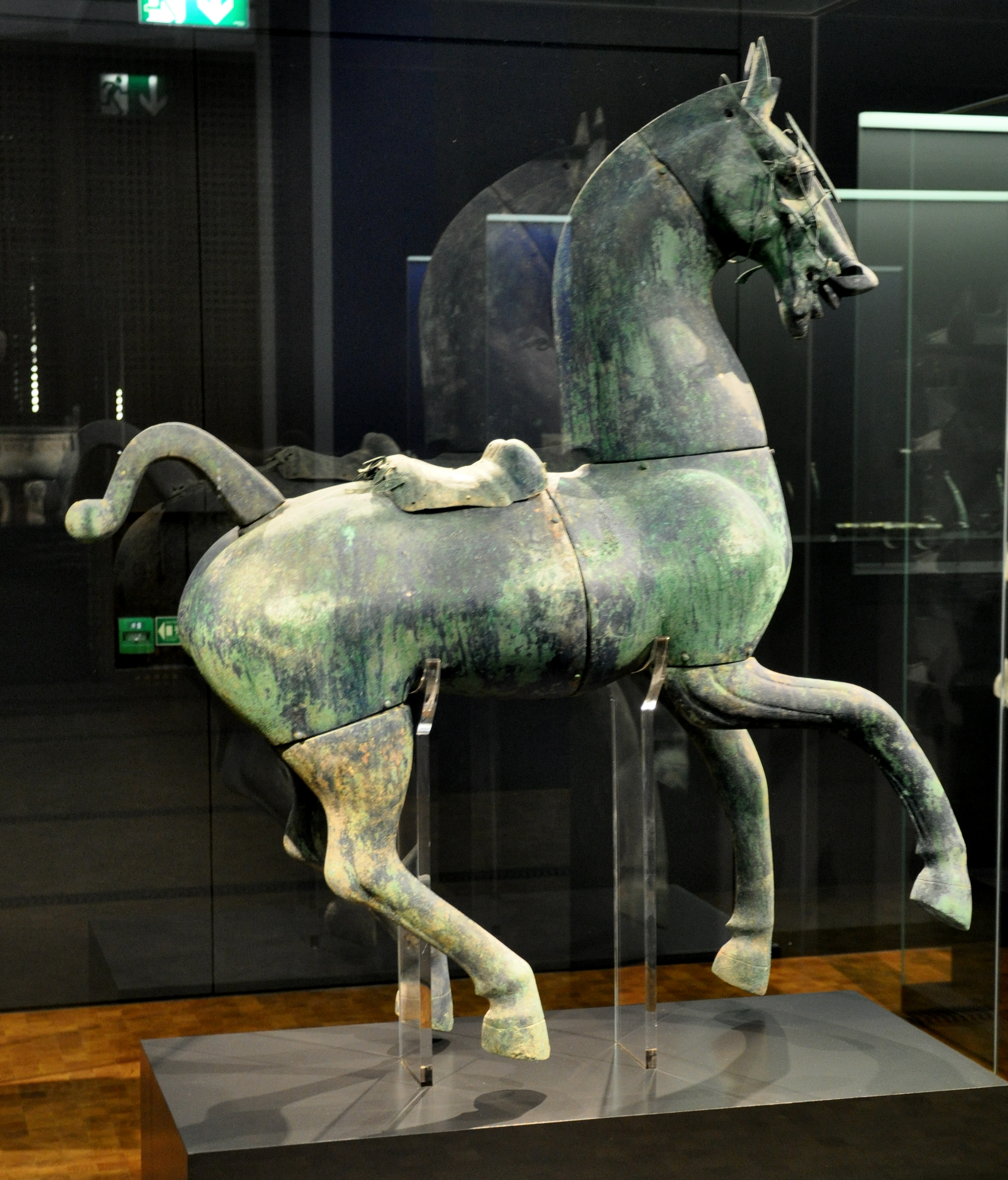 Pferd, östliche Han-Dynastie, 2. Jahrhundert, Bronze Museum Rietberg, Zürich; Geschenk Alice und Pierre Uldry